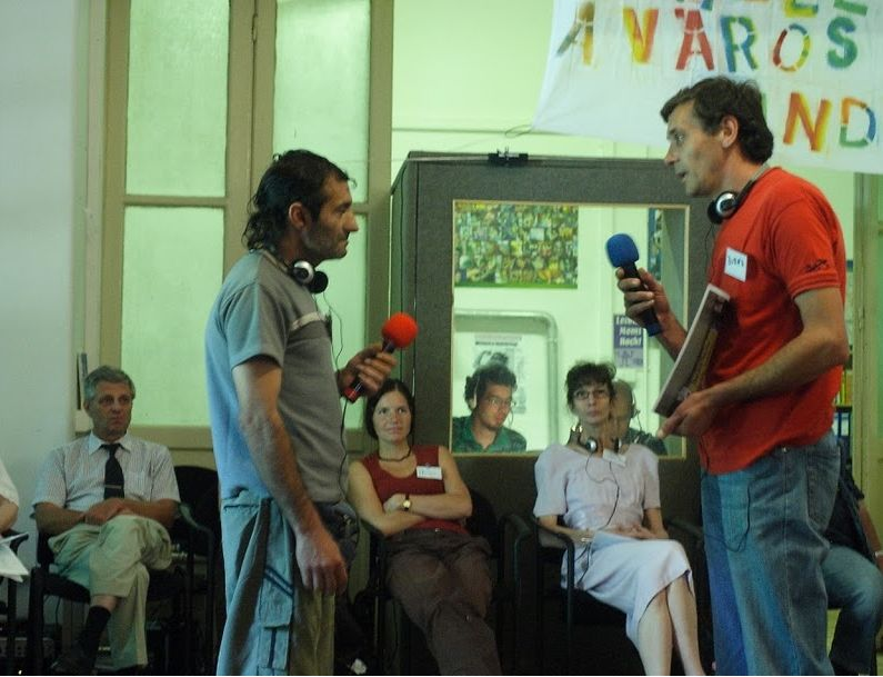 A PTH képzés